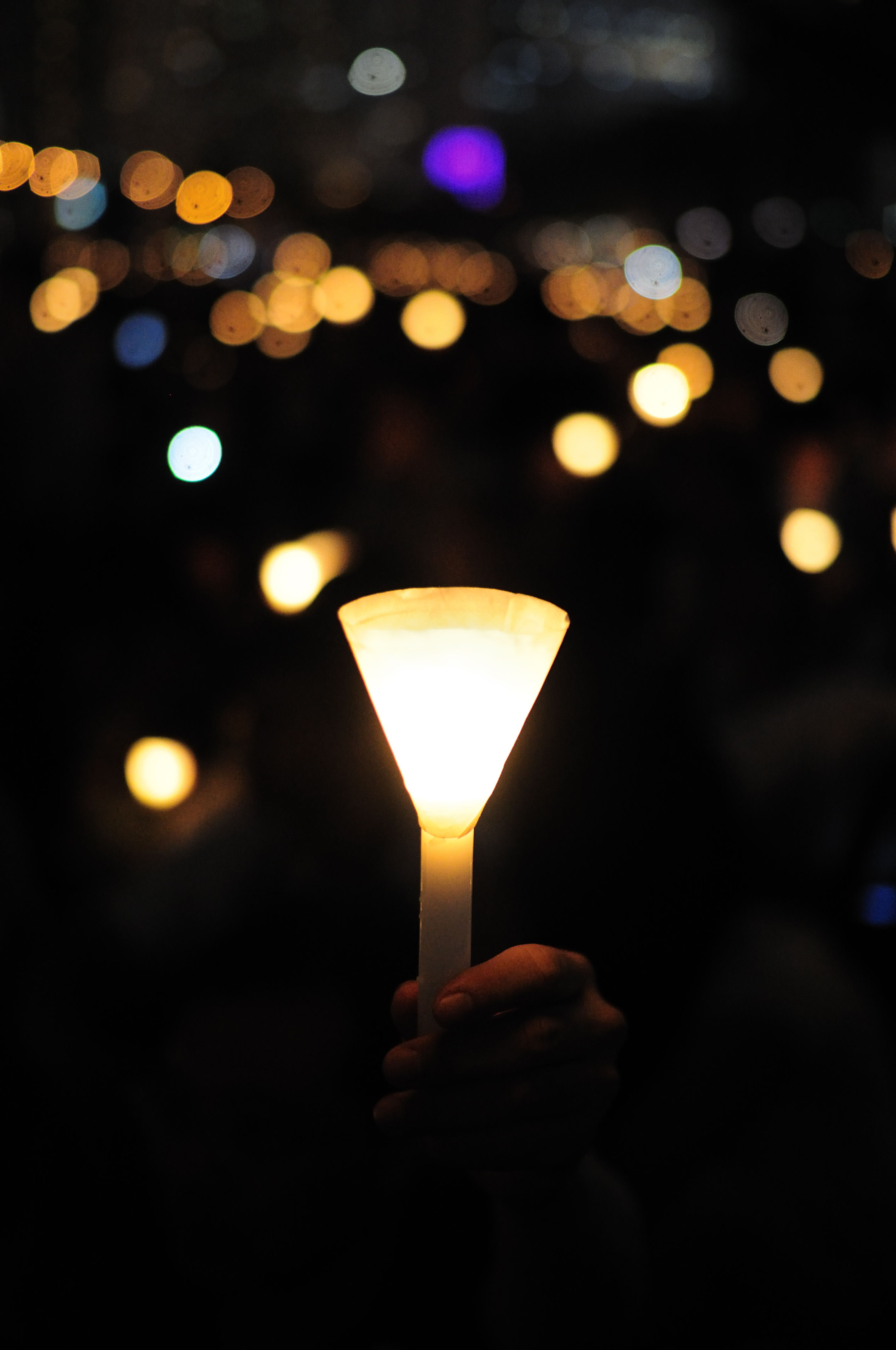 維園平反六四21週年燭光晚會 2010